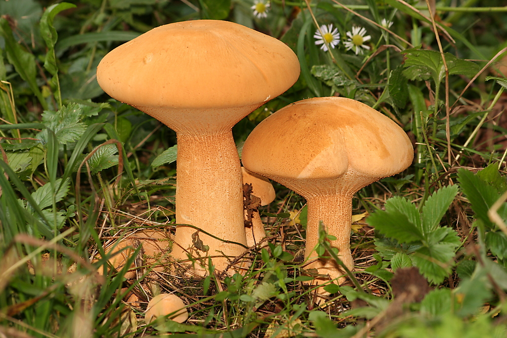 Phaeolepiota aurea